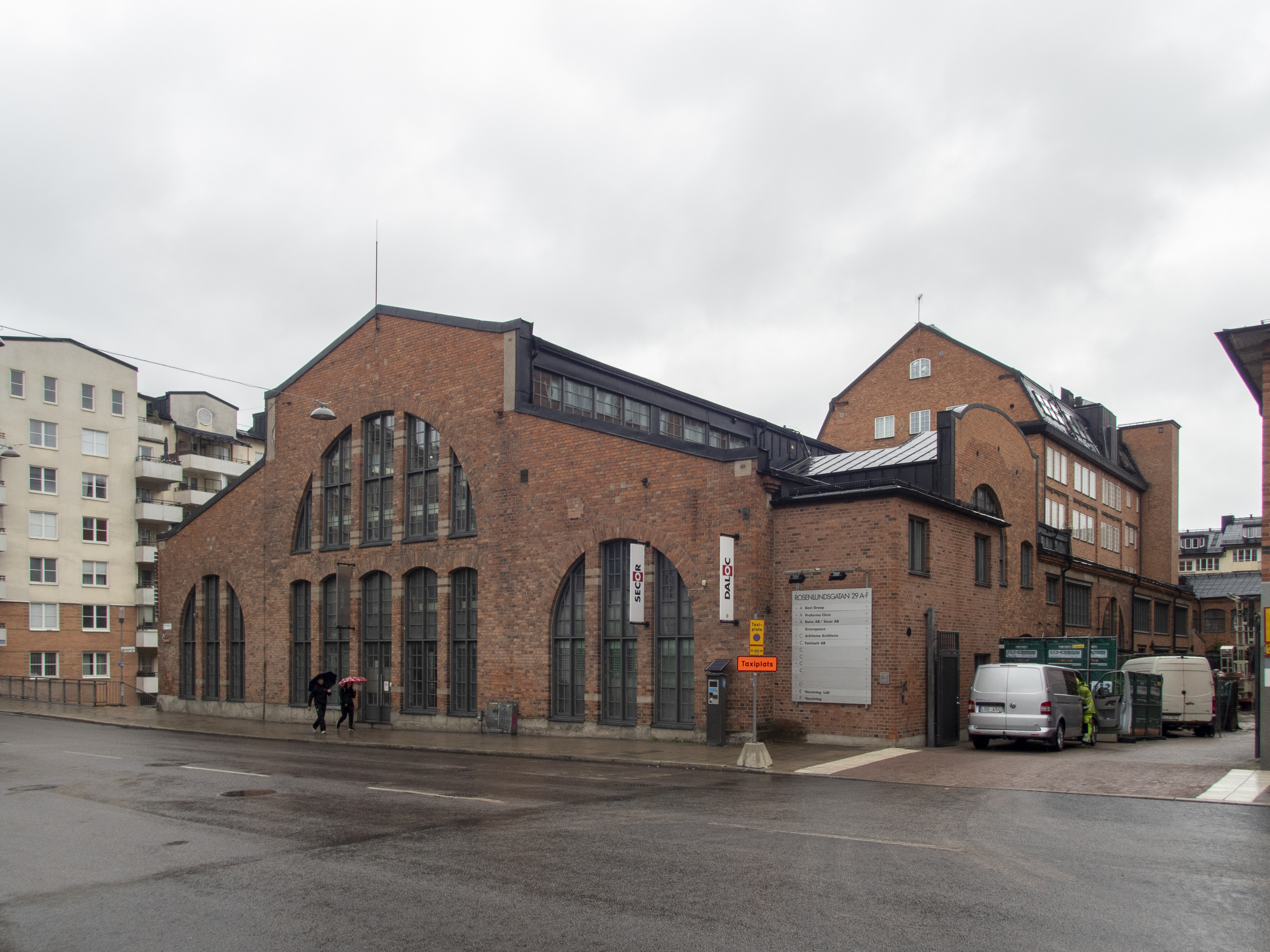 Trumman 2, Rosenlundsgatan 29 Stockholm gjuteri för Luth & Roséns Elektriska. Byggnadsår 1906-09 Arkitekter: Georg A Nilsson, Ivar Nyqvist